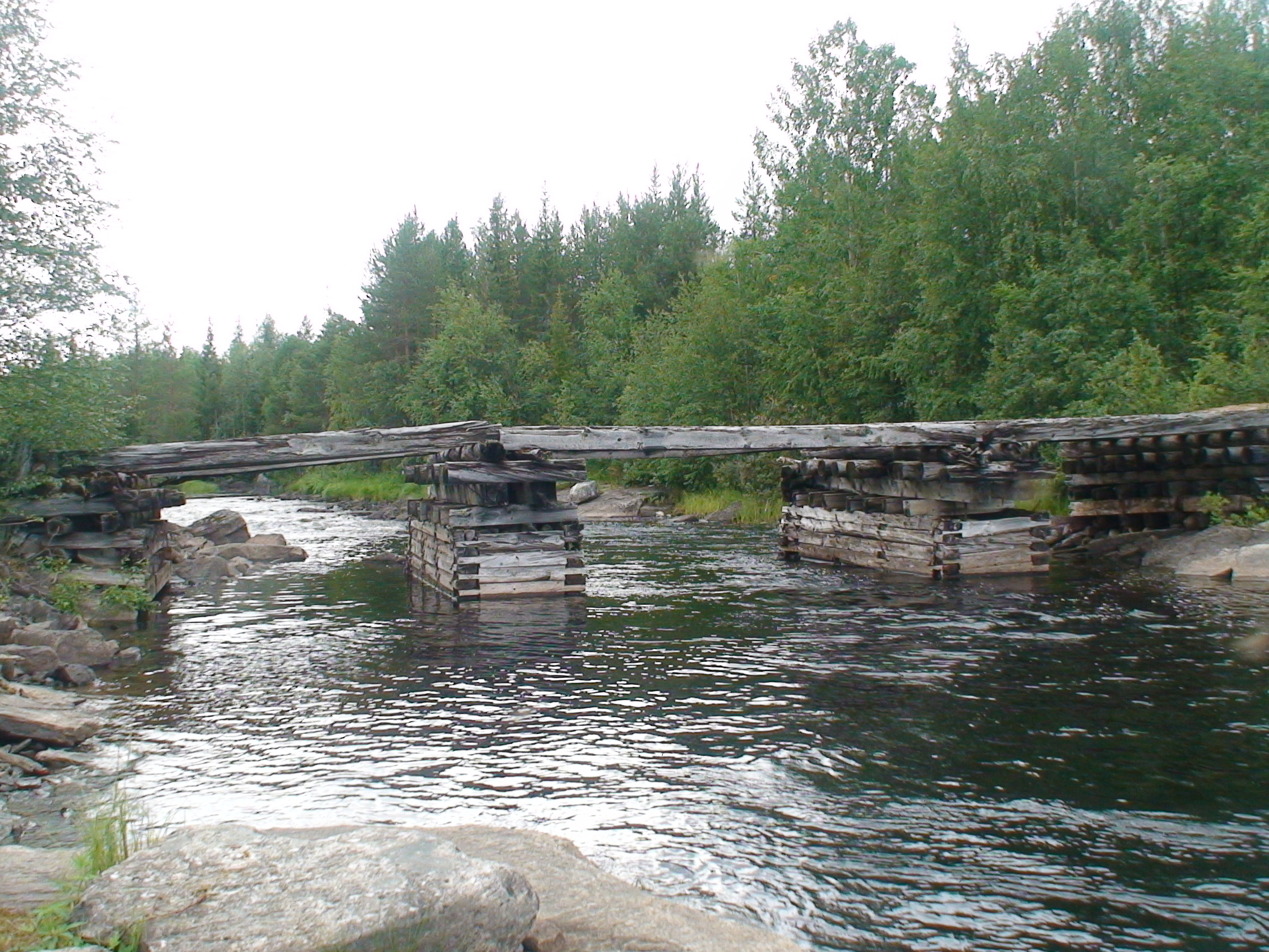 Мост через Верман у устья.